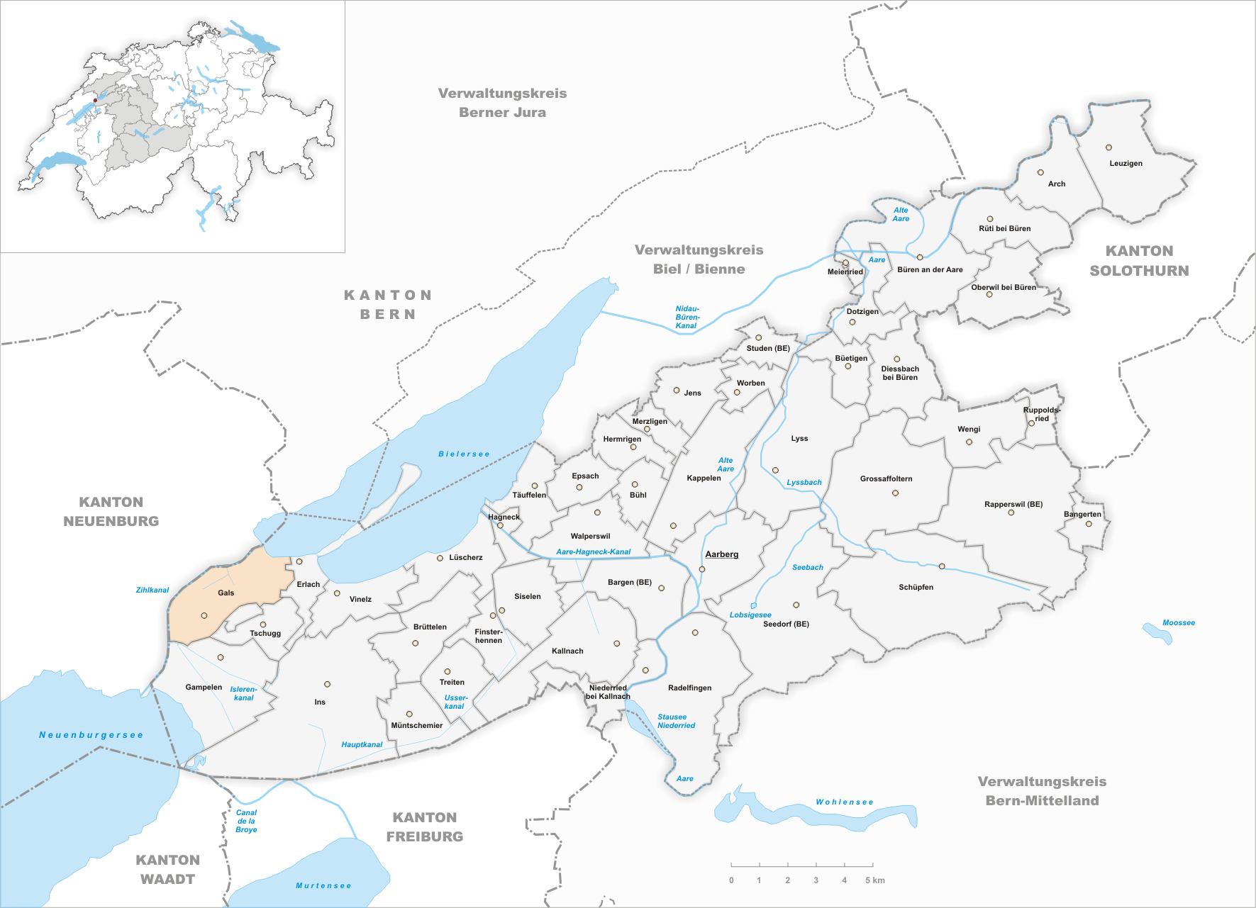 Municipality Gals